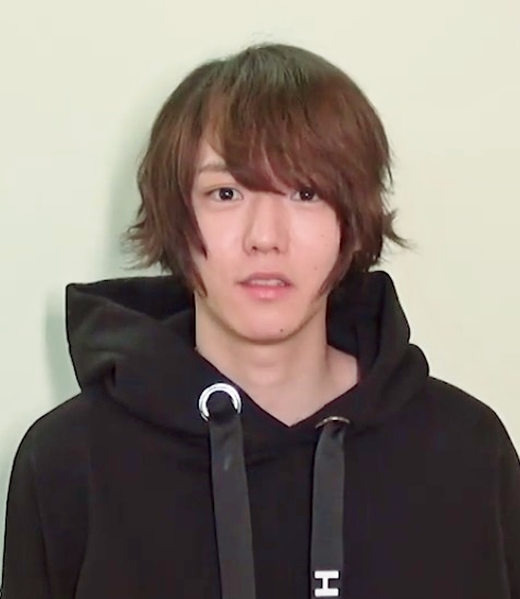 櫻井圭登（俳優） 『沼落ち5秒前! -俳優編第34回-』0:03辺りのスクリーンショット